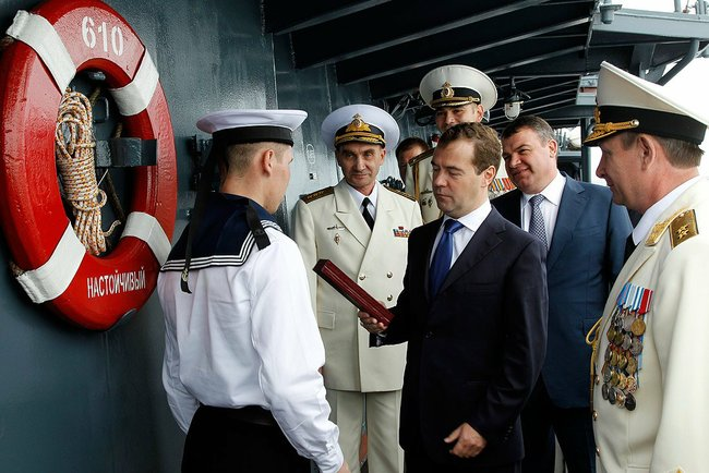 Во время посещения флагманского корабля Балтийского флота эскадренного миноносца «Настойчивый» Дмитрий Медведев поздравил одного из матросов с Днём рождения.